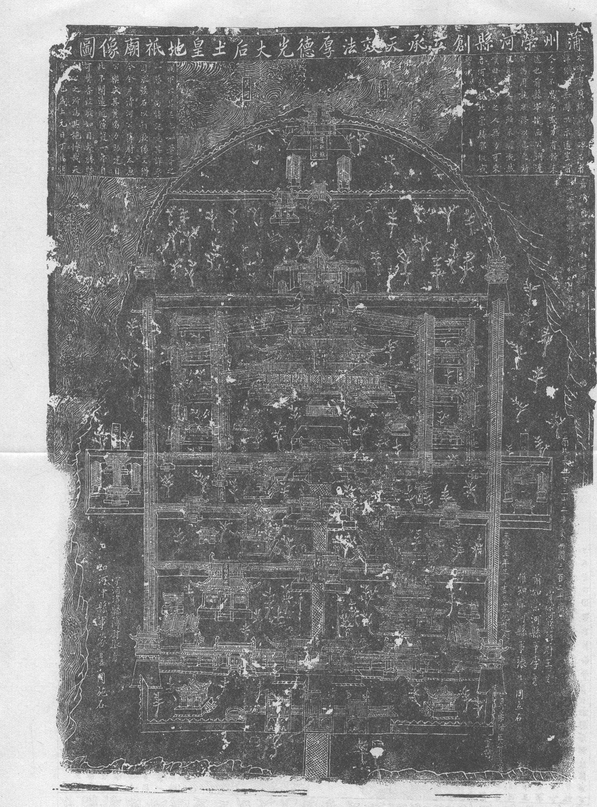 金天会十五年（1137）刊刻，明嘉靖三十五年（1556）、天启三年（1623）重刻《蒲州荣河县创立承天效法厚德光大后土皇地祇庙像图石》碑拓本。